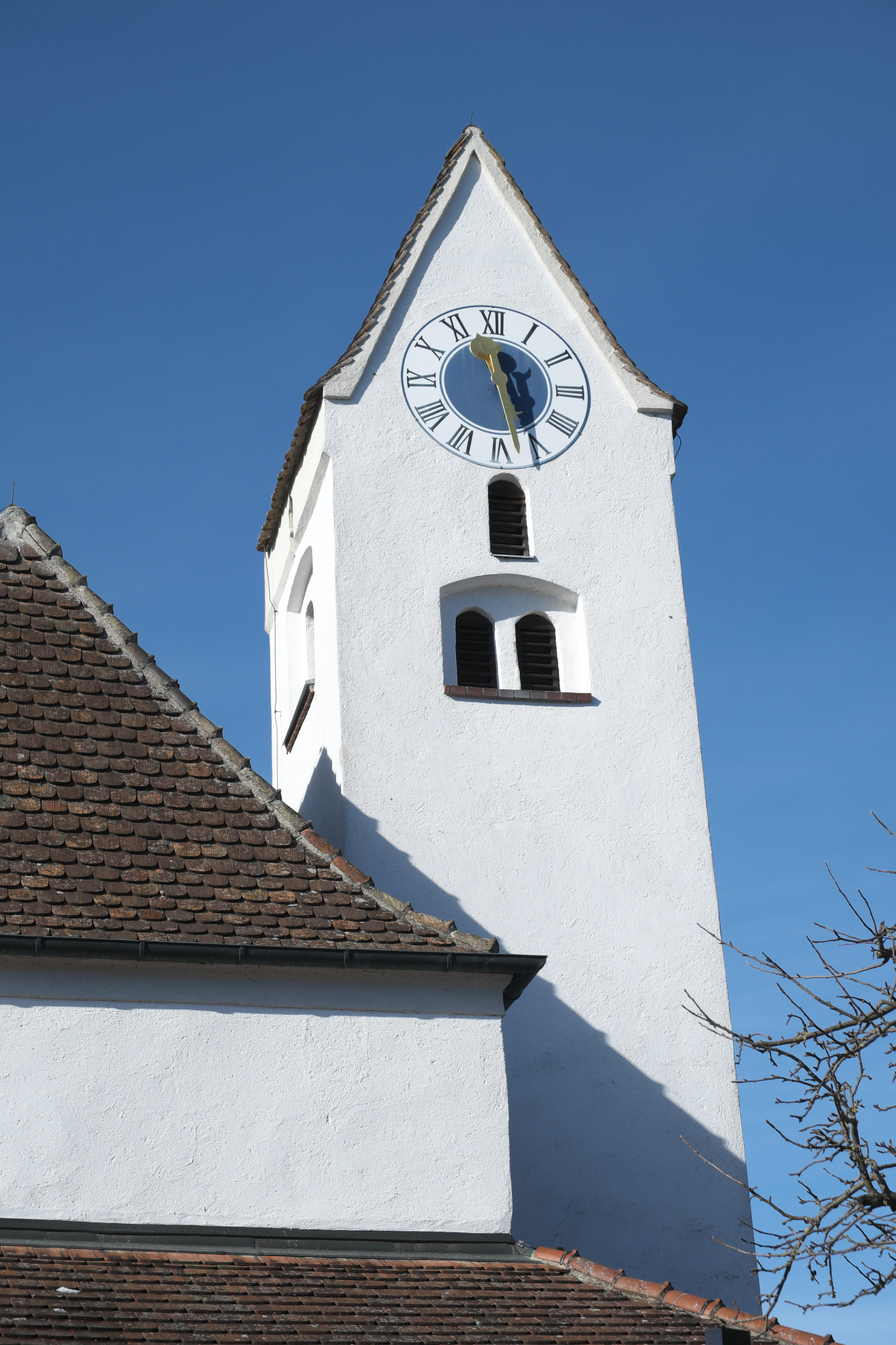 Alte katholische Pfarrkirche St. Johannes der Täufer in Breitbrunn am Ammersee (Herrsching am Ammersee) im Landkreis Starnberg (Bayern/Deutschland)